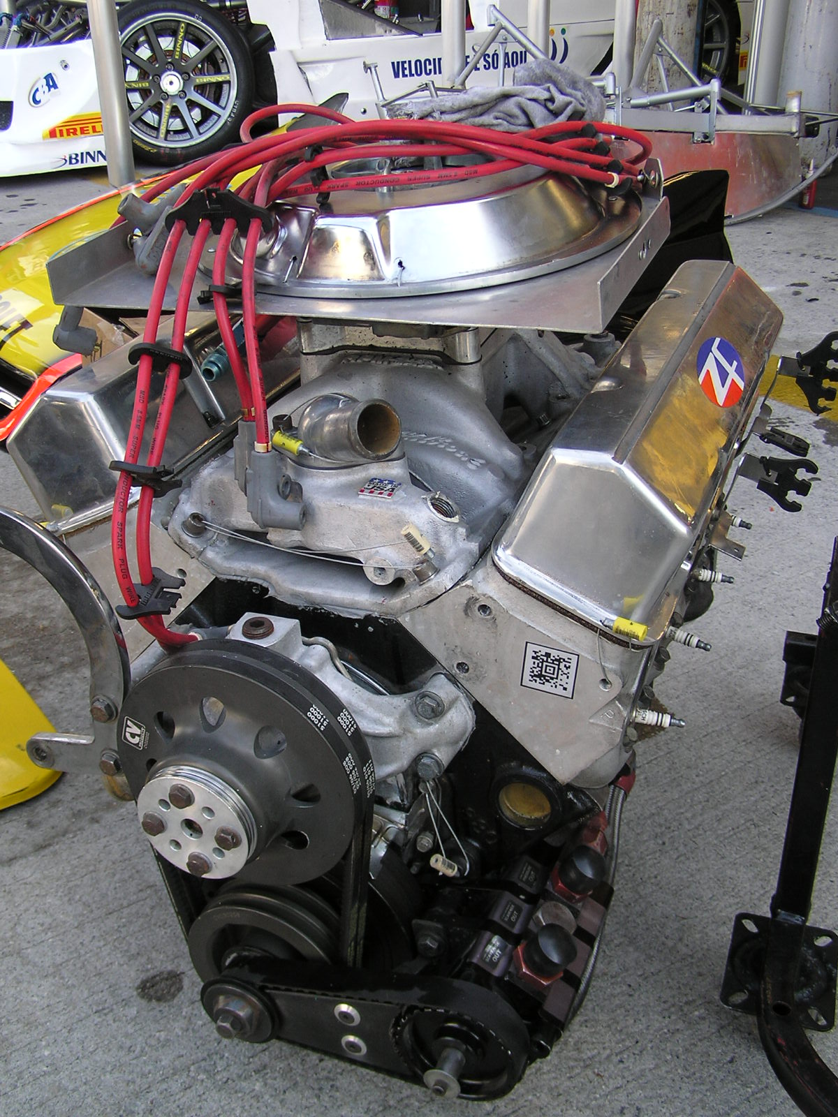 Stock Car V8 light: Chevrolet-ZF engine.